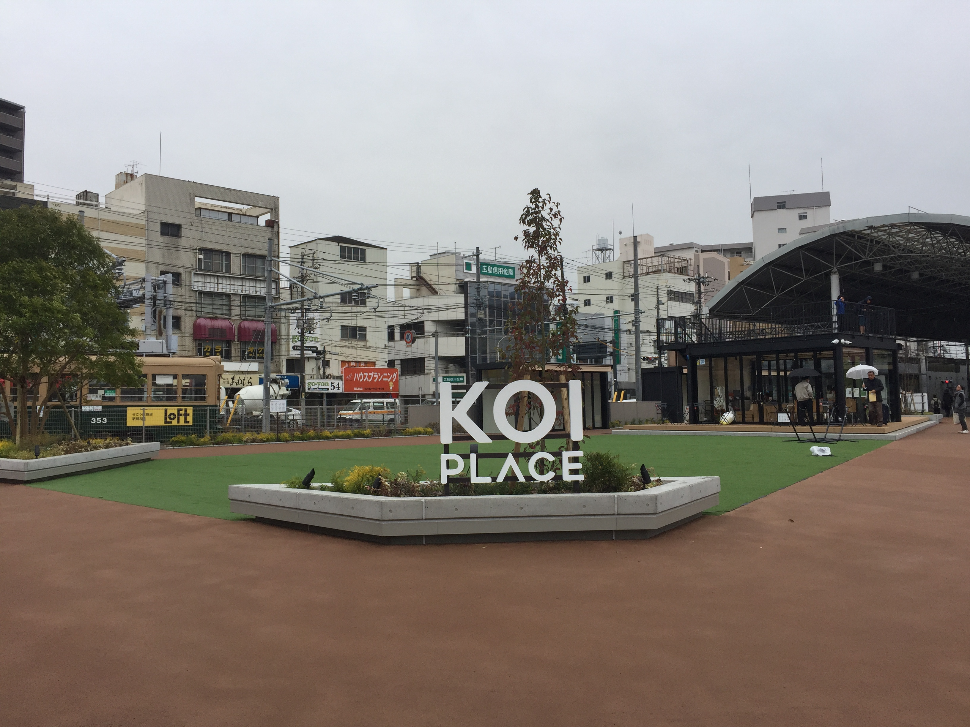 ひろでん会館跡地の暫定活用